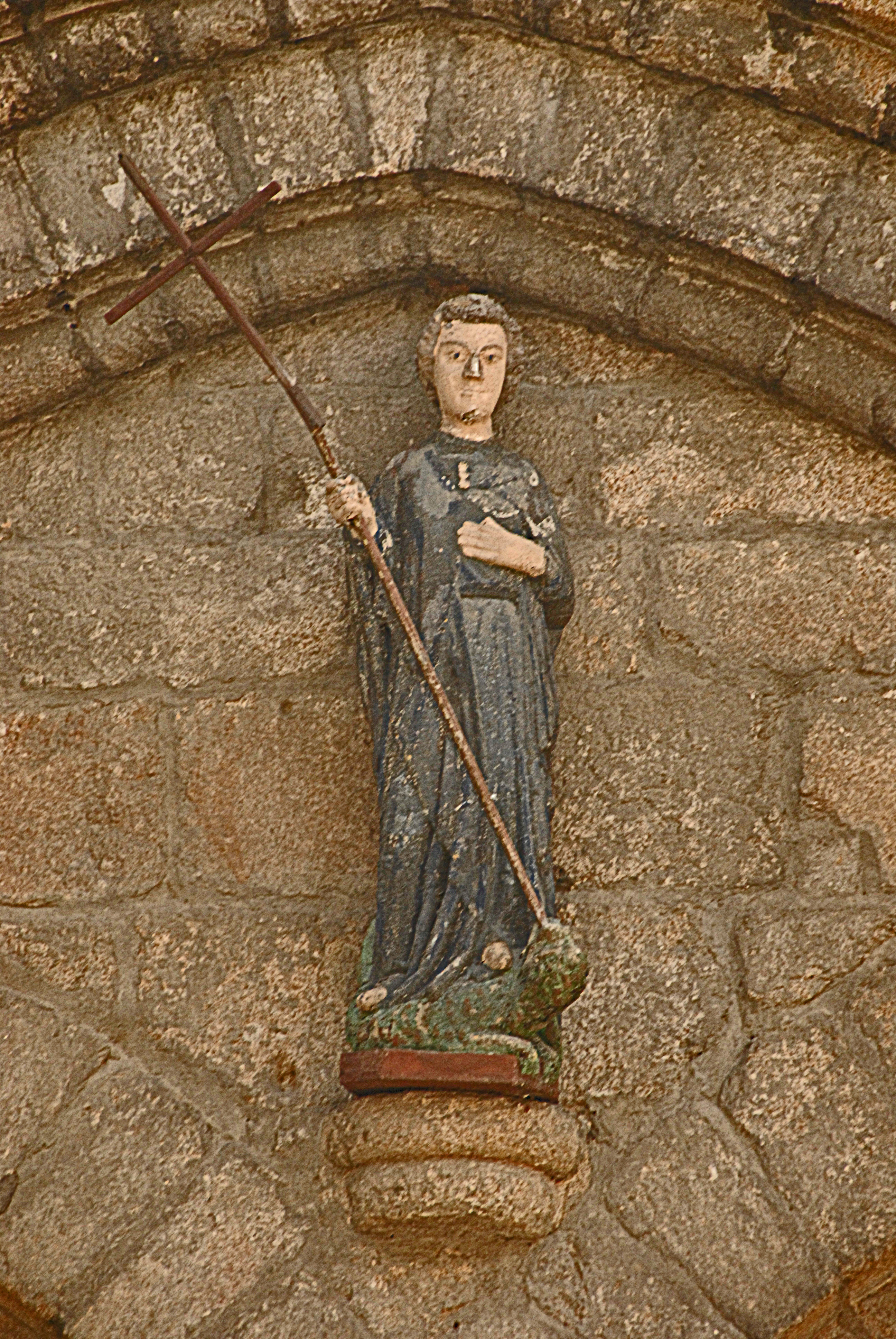 St-Junien, Hauptportal, Drachentöter